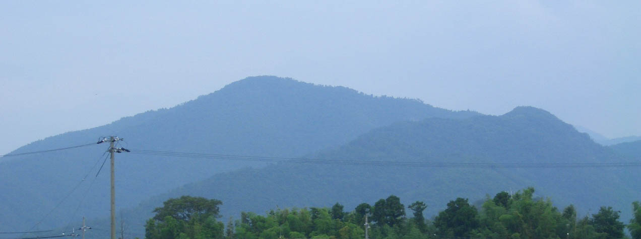 滋賀県長浜市の小谷山を南から望む